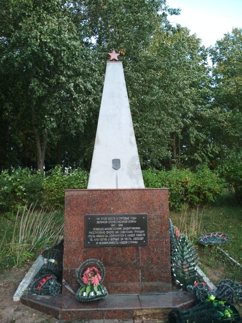 Помнік расстраляным савецкім грамадзянам падчас Другой сусветнай вайны